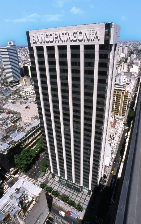 Banco Patagonia (Torre La Buenos Aires). Av. de Mayo. 715, Buenos Aires.